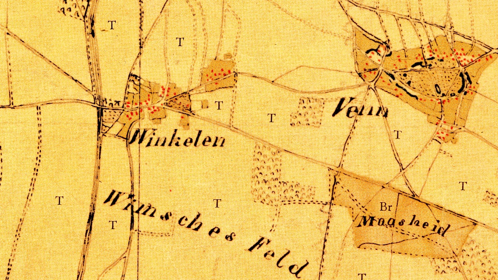 Kartenaufnahme der Rheinlande durch Tranchot und von Müffling, Blatt 42 (Viersen), Ausschnitt mit dem Gebiet der Dörfer Winkeln und Venn.